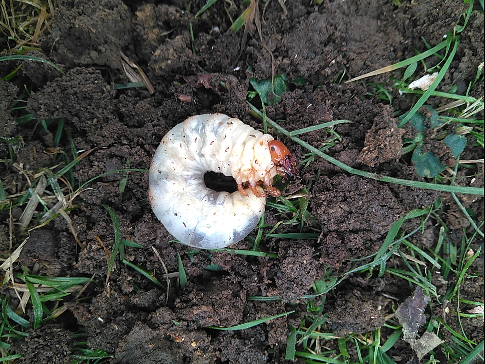 Raíña da traza da madeira, procedente do interior do toro dunha maceira seca.